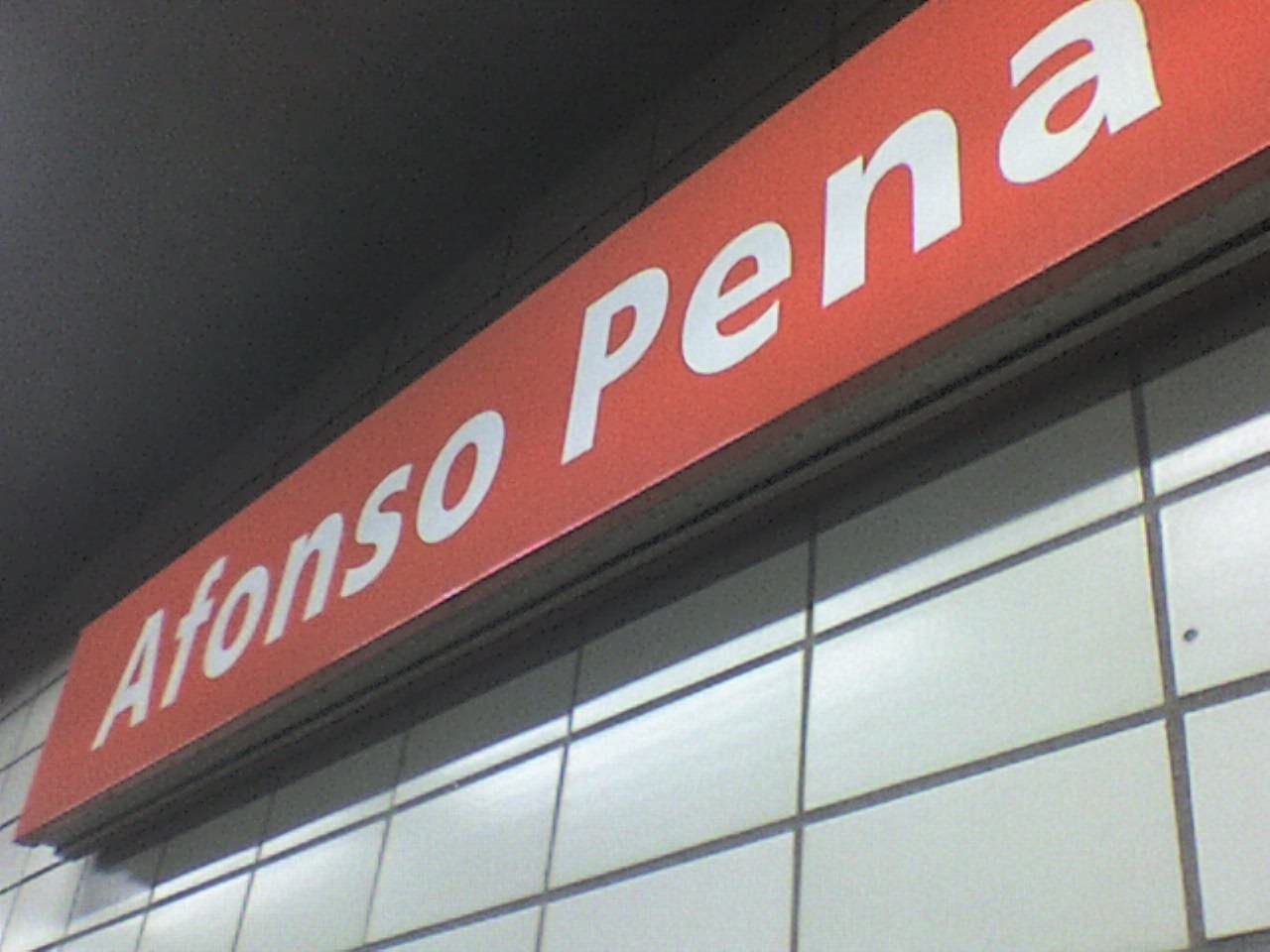 Placa de estação de metrô Afosno Pena. na Tijuca, Rio de Janeiro-RJ/Brasil.